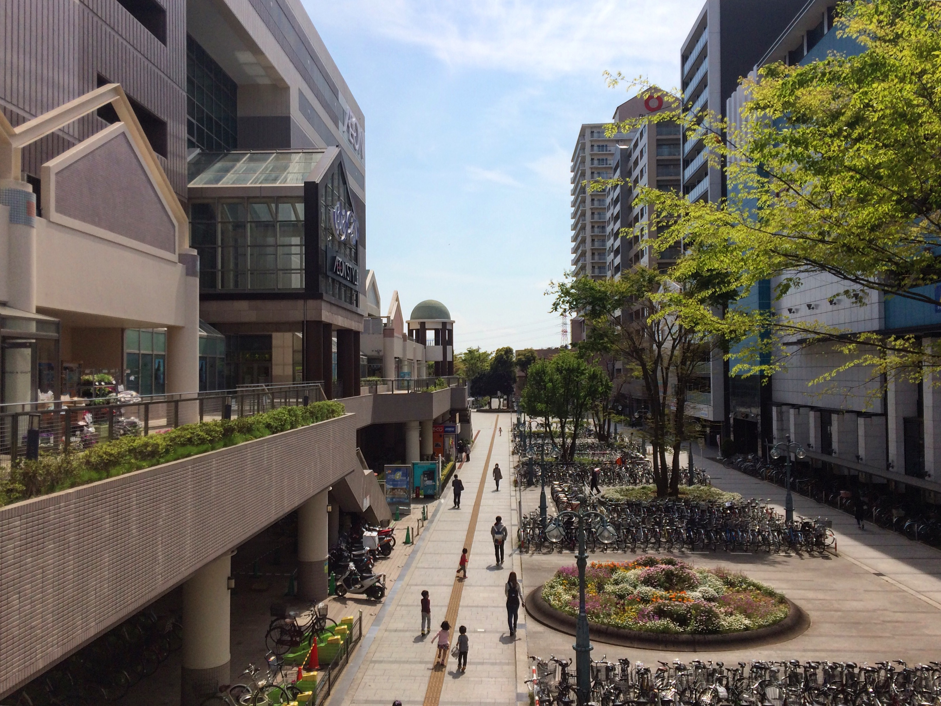 おゆみ野センターモールの景色